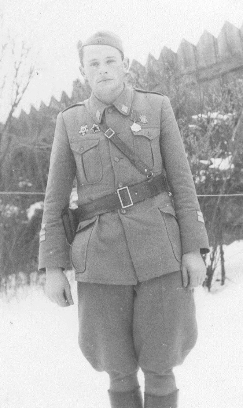 Stevo Rauš (Brezičani, kod Prijedora, 23. oktobar 1916 — Beograd, Srbija, 1. avgust 1998), učesnik Narodnooslobodilačke borbe, general-pukovnik JNA i narodni heroj Jugoslavije.